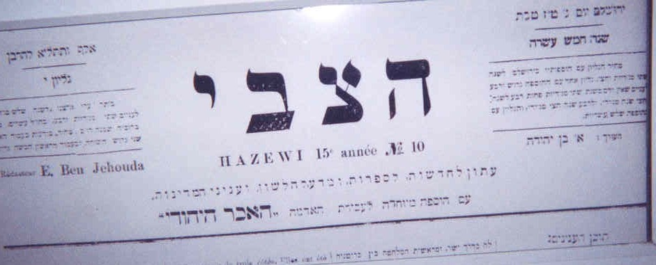 Foto einer Kopie der Zeitung HaZewi von Eliezer Ben Jehuda (zwischen 1884 und 1914)